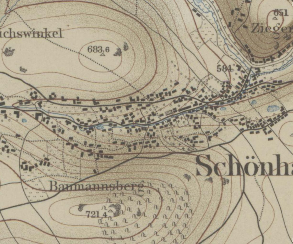 Sächsische Äquidistantenkarte im Maßstab 1: 25.000 von 1876 (Link zur Karte in der Universitätsbibliothek Dresden): In der unteren Dorfmitte von Schönheide im Erzgebirge fällt der noch unverrohrt durch das Dorf fließende Dorfbach auf, der am „Bayerischen Hof“ in den aus Neuheide kommenden Filzbach mündet. Am früheren "Teichplatz" (später Gustav-Haupt-Platz und zu DDR-Zeiten "Platz des Friedens") ist der Teich zu sehen, der vor dem heutigen Haus Hauptstraße 78 lag. Auf der der Kirche gegenüber liegenden Fläche ist der bis um 1838 betriebene Friedhof eingezeichnet, aber auch schon der ab 1838 angelegte und am 10. Januar 1839 eröffnete Friedhof unterhalb des Knock. Dessen Erweiterung im Jahr 1883 kann im Vergleich mit der nach der Landkarte von 1876 als nächster herausgebrachten aus dem Jahr 1905 festgestellt werden.